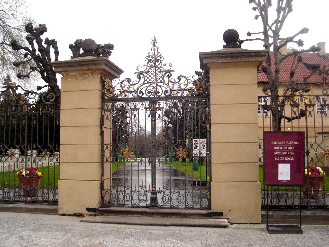 Királyi kert a prágai várban